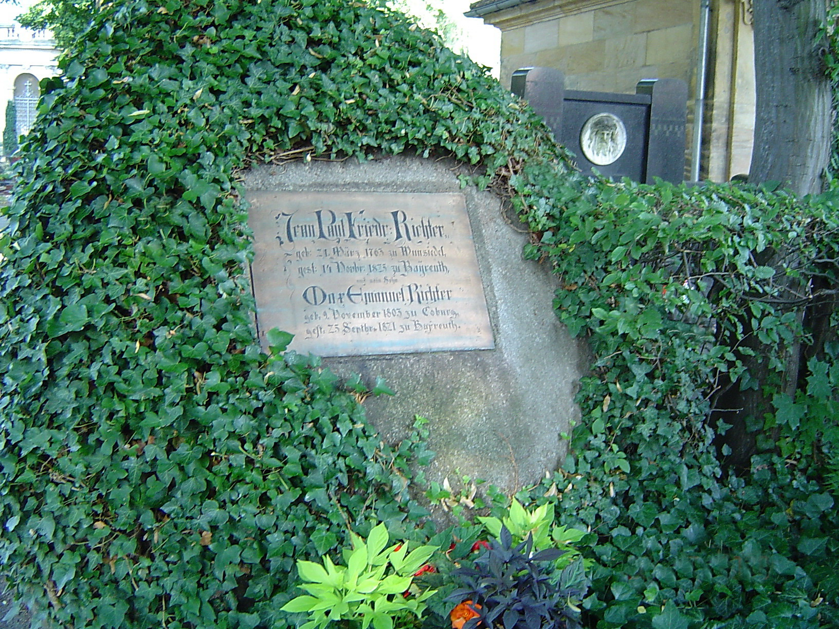 Stadtfriedhof (Bayreuth), Grabstätte von Jean Paul